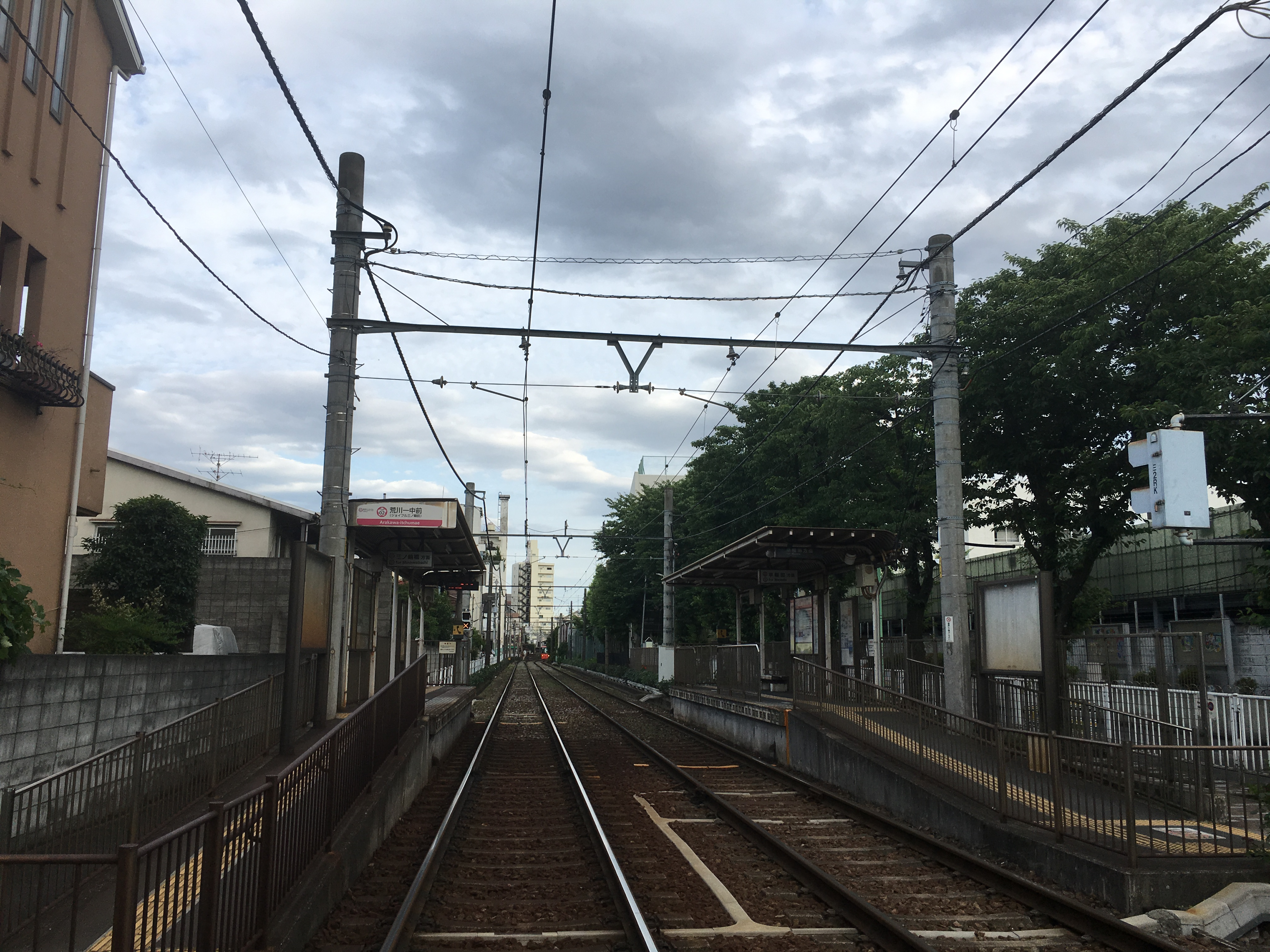 Arakawa-itchumae Station (荒川一中前停留場)